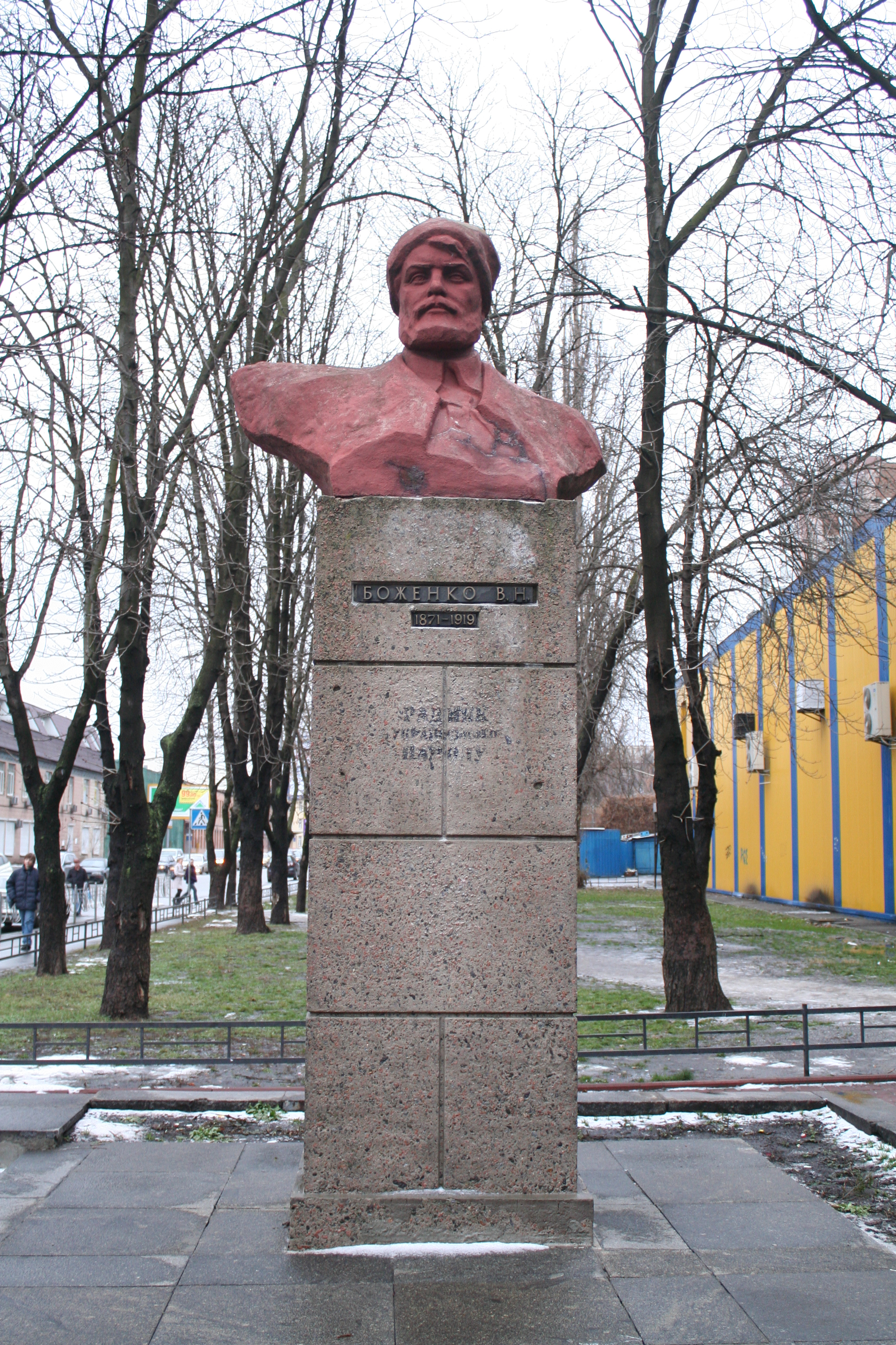 м.Київ, вул. Боженка, 107, Пам'ятник герою громадянської війни Боженко Василю Назаровичу